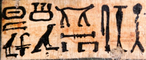 Faixa de hieróglifos pintados, identificando Sha-Amun-en-su, em seu esquife.